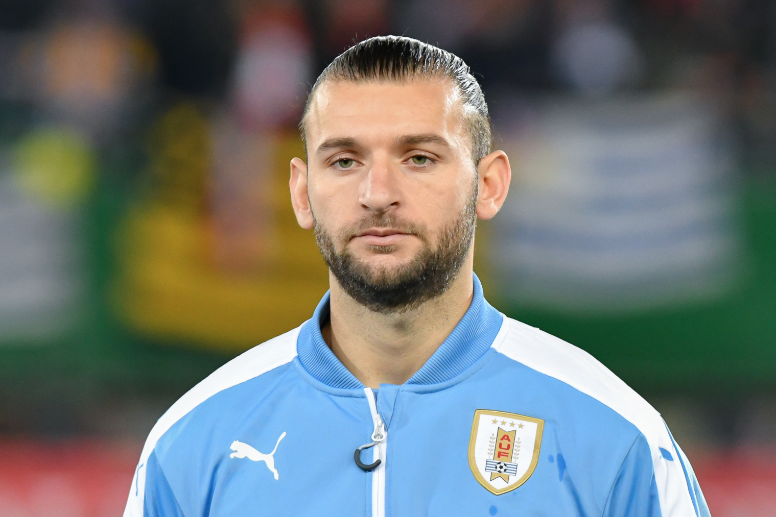 Wien, Österreich, 14.11.2017, Sport, Fussball, OEFB Freundschaftliches Laenderspiel - Österreich vs Uruguay. Bild zeigt Gaston Silva (URU).